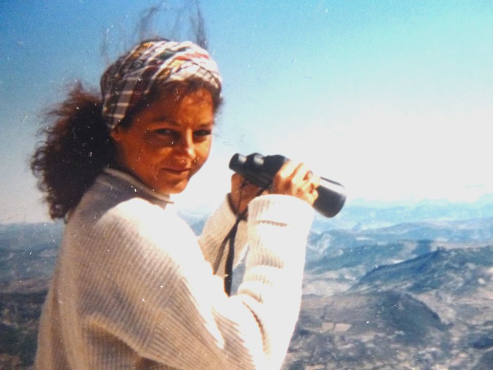 Ghislaine Dupont (1956-2013) au sommet du Ventoux (France)